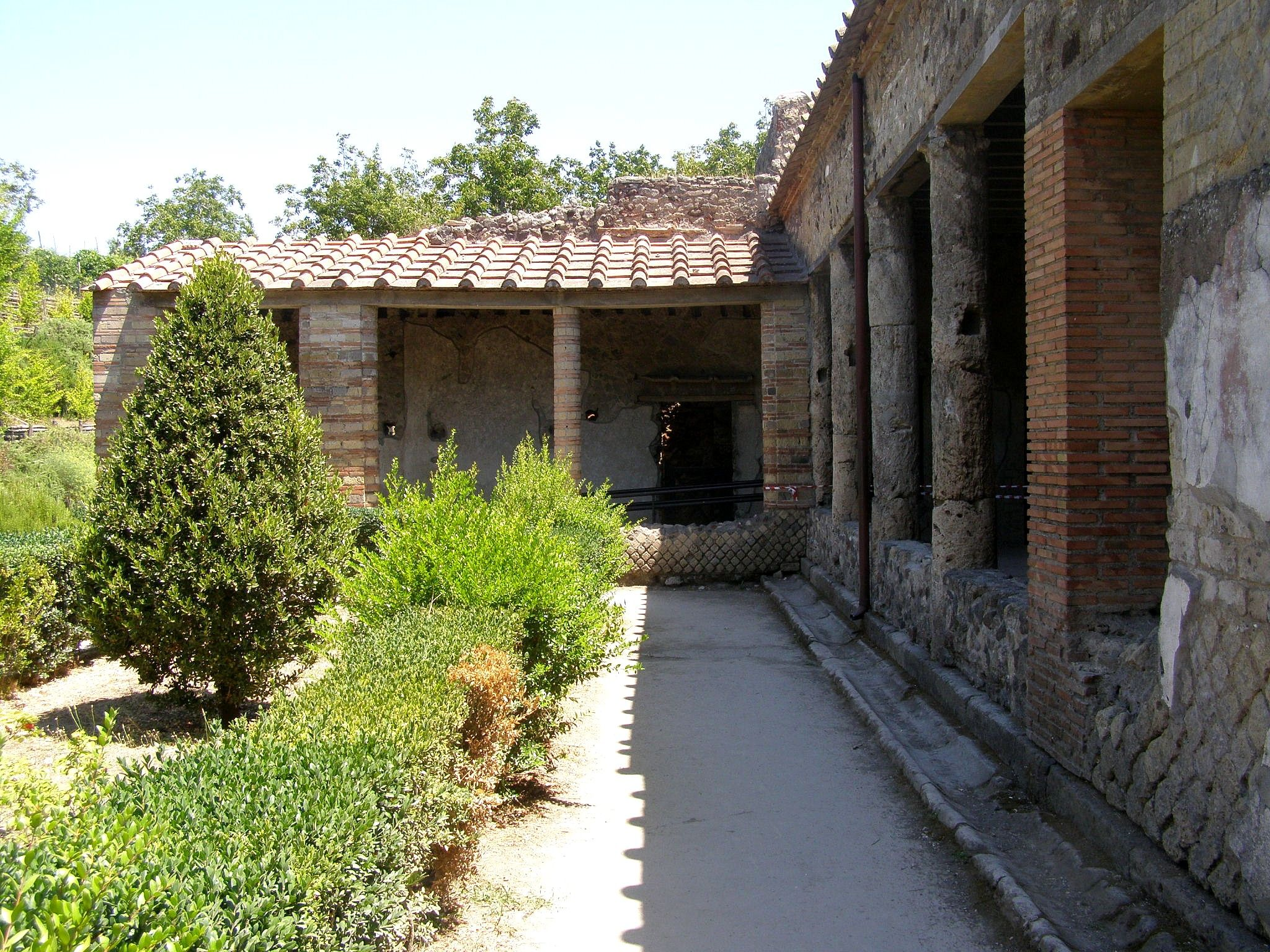 Záhrada Vily Mystérií